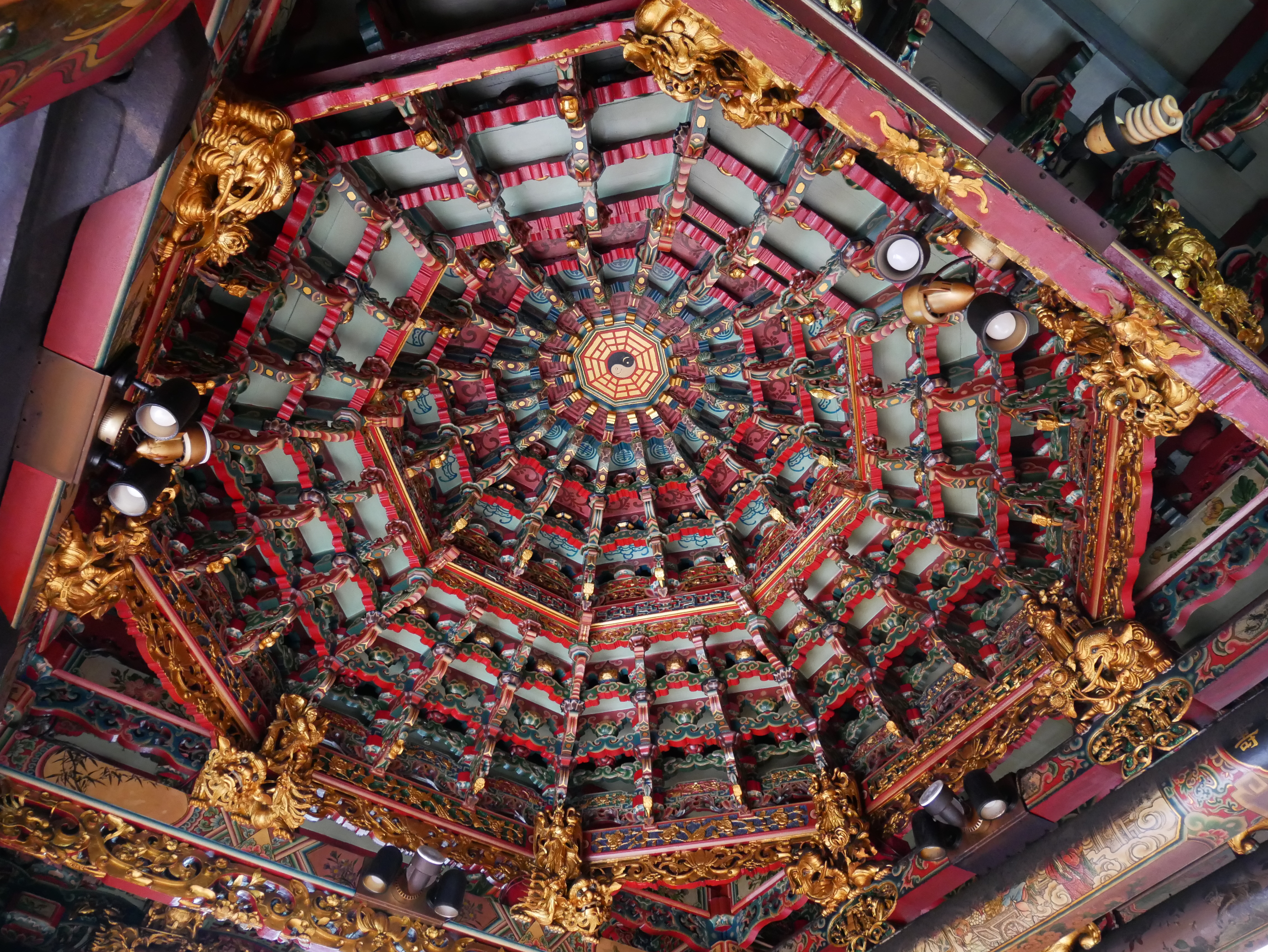 中文（台灣）: 新竹都城隍廟三川殿天井，新竹市北區北門聯里中山里